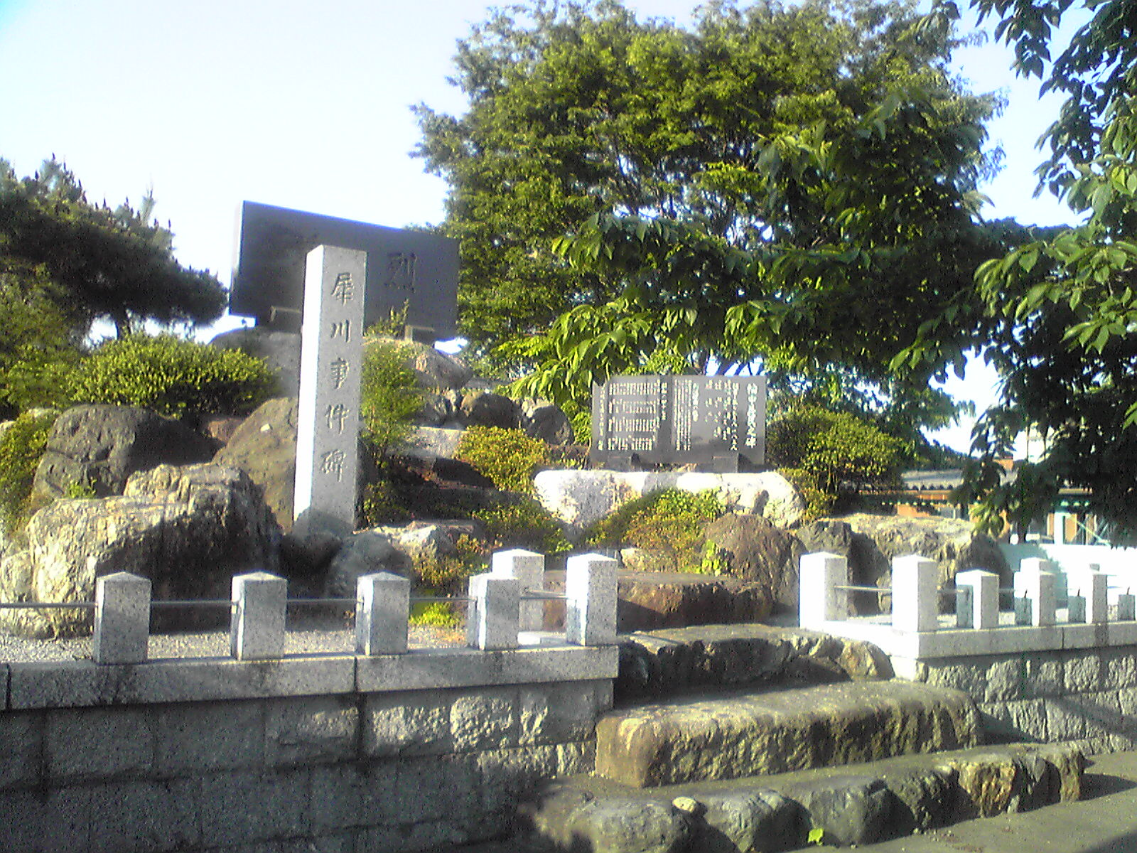 Saikawa Jiken Kinenhi(犀川事件を記念した石碑)、Anpachi,Gifu,Japan(岐阜県安八町)